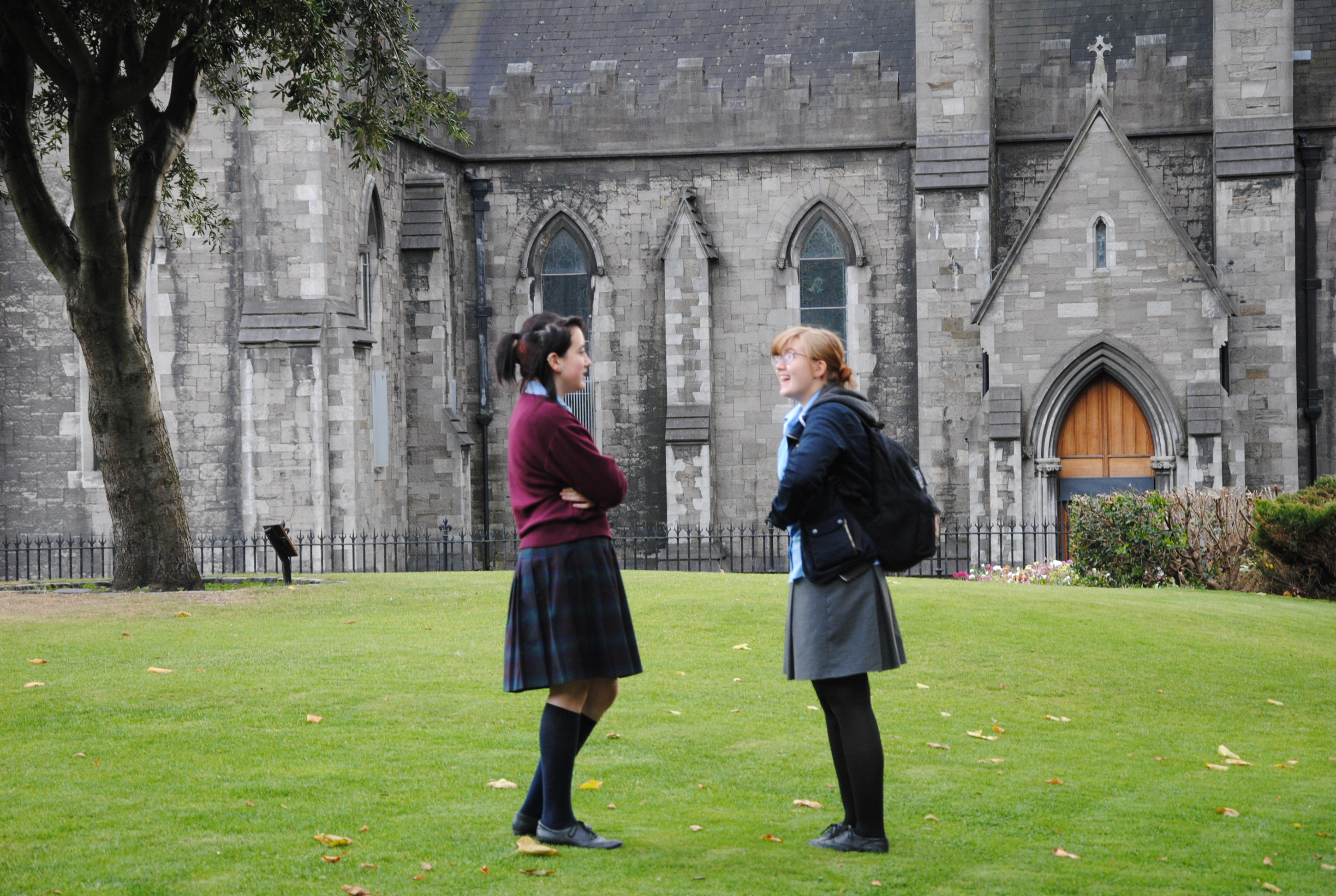 Dublin, Irlanda.